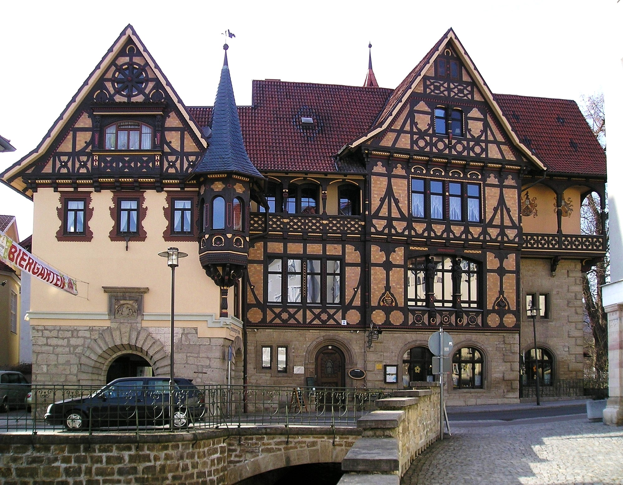 Henneberger Haus, ein Stadtbild prägender Fachwerkbau in Meiningen.